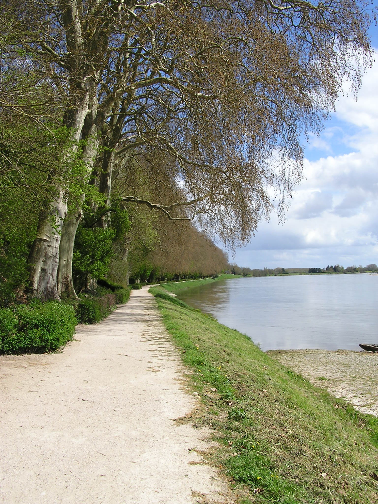 vue photographique (paysage)